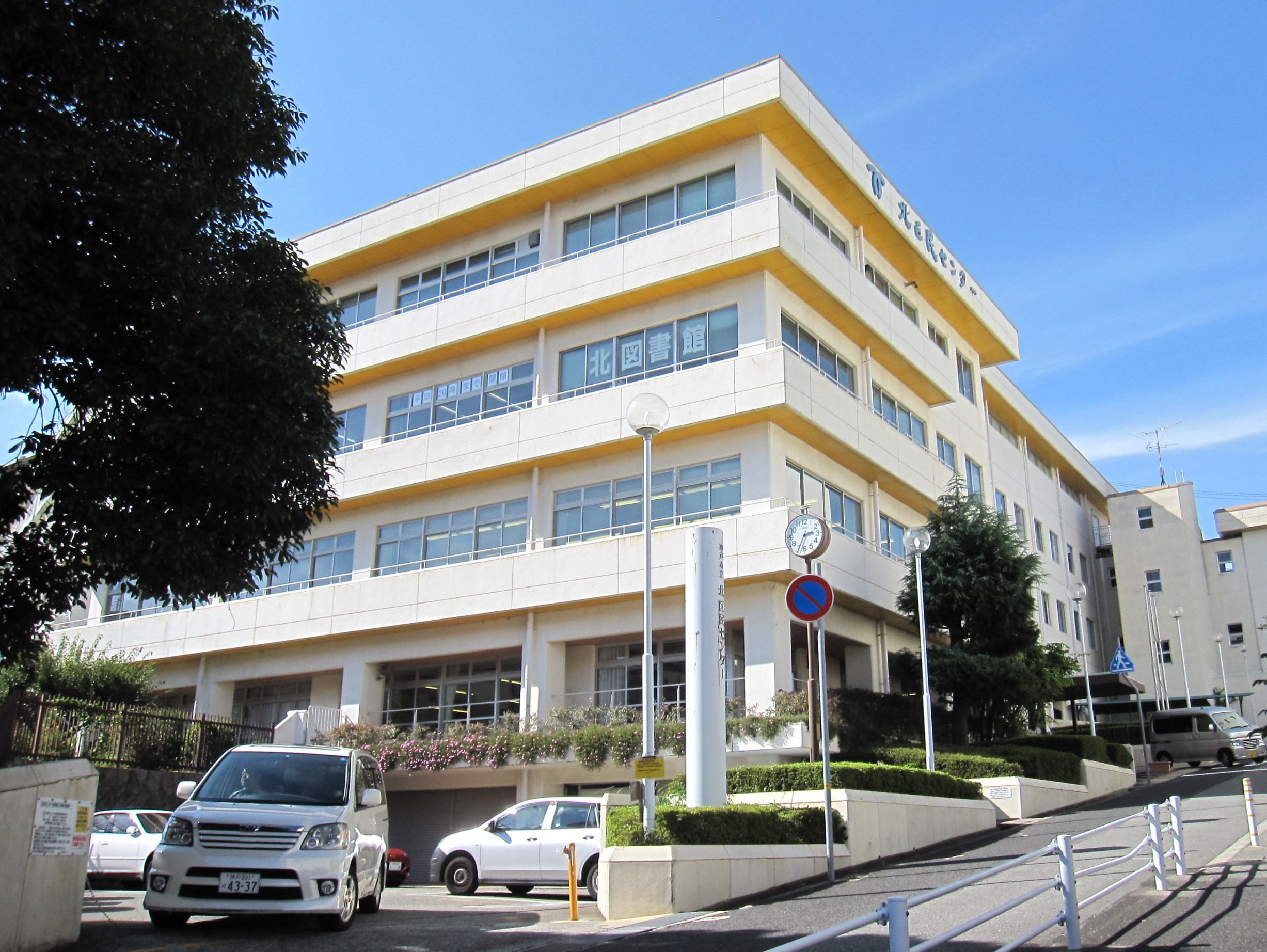 神戸市北区民センター